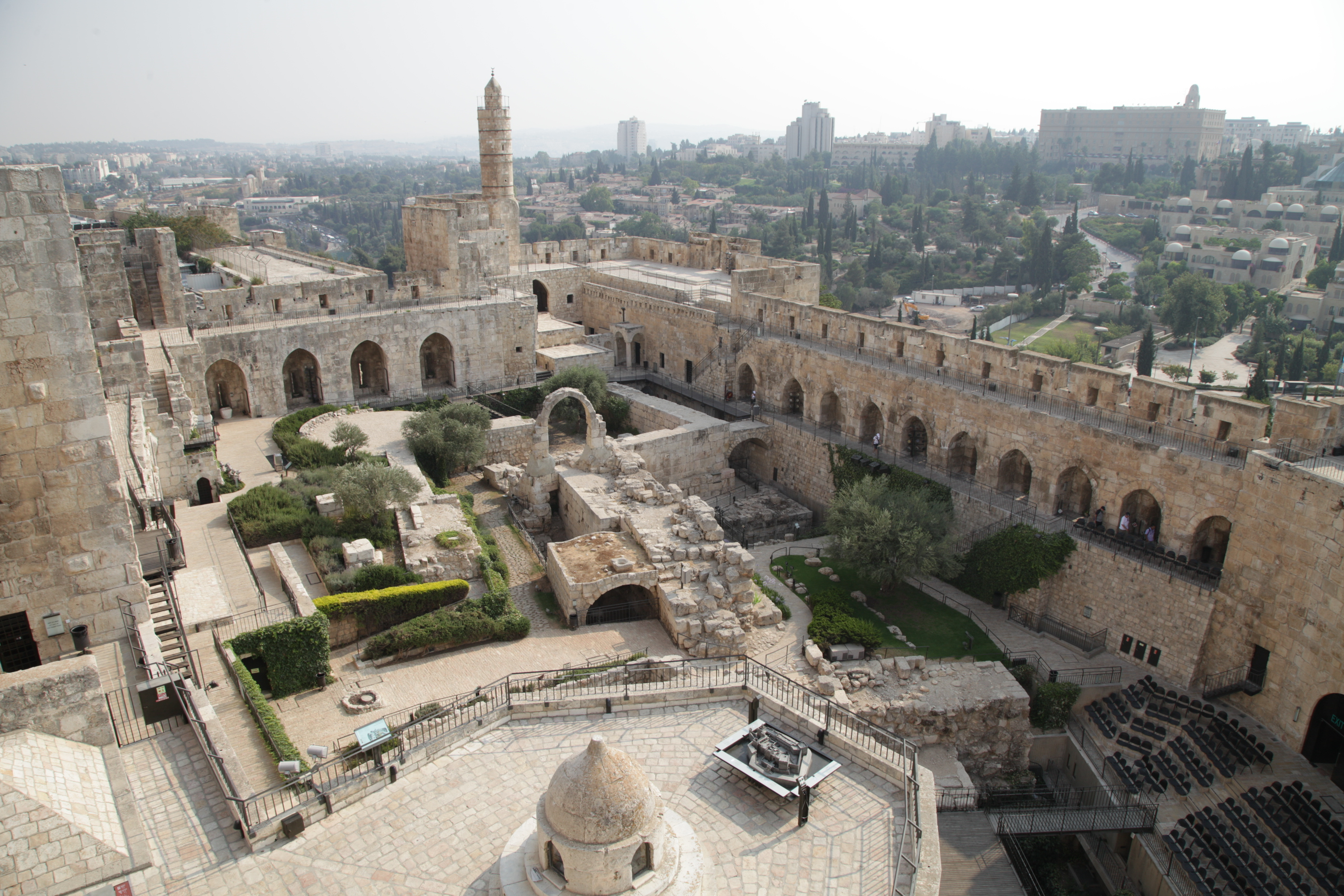 Vue depuis le haut de la citadelle de Jérusalem. Jerusalem 07/2012